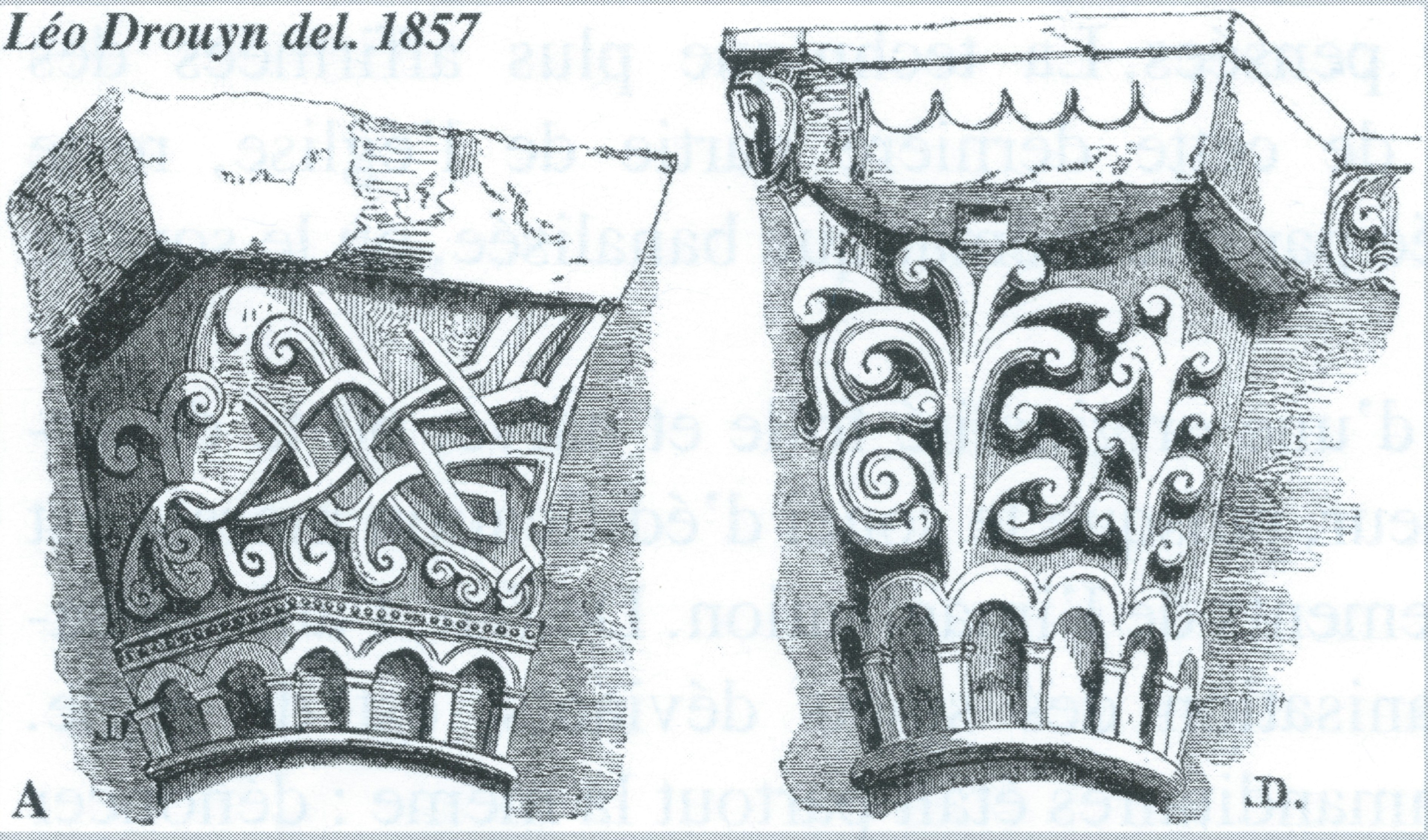 Chapiteaux du choeur